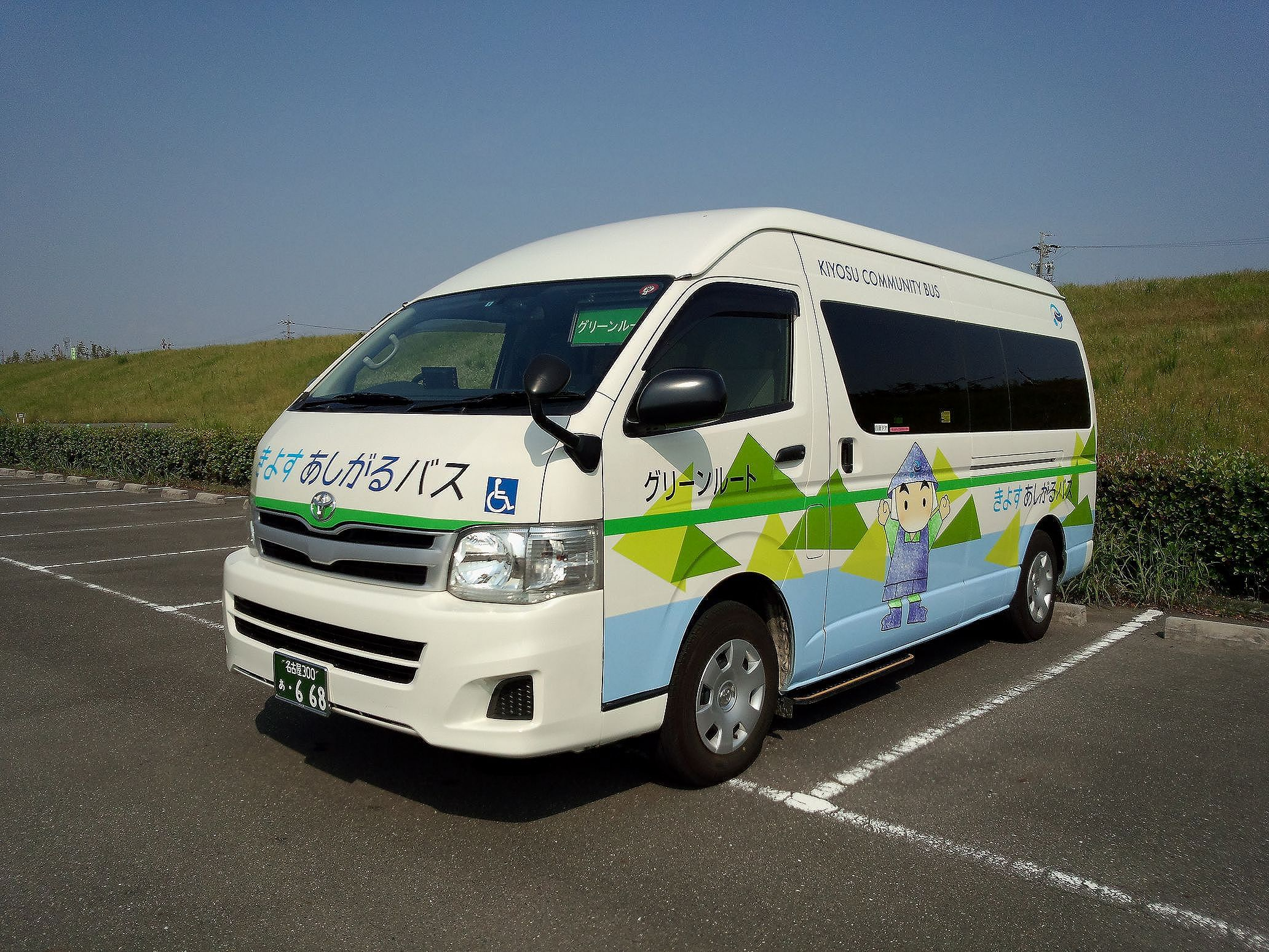 定員8名 リフト付